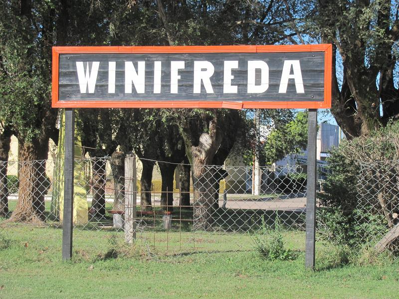 Estación Winifreda, provincia de La Pampa, Argentina.